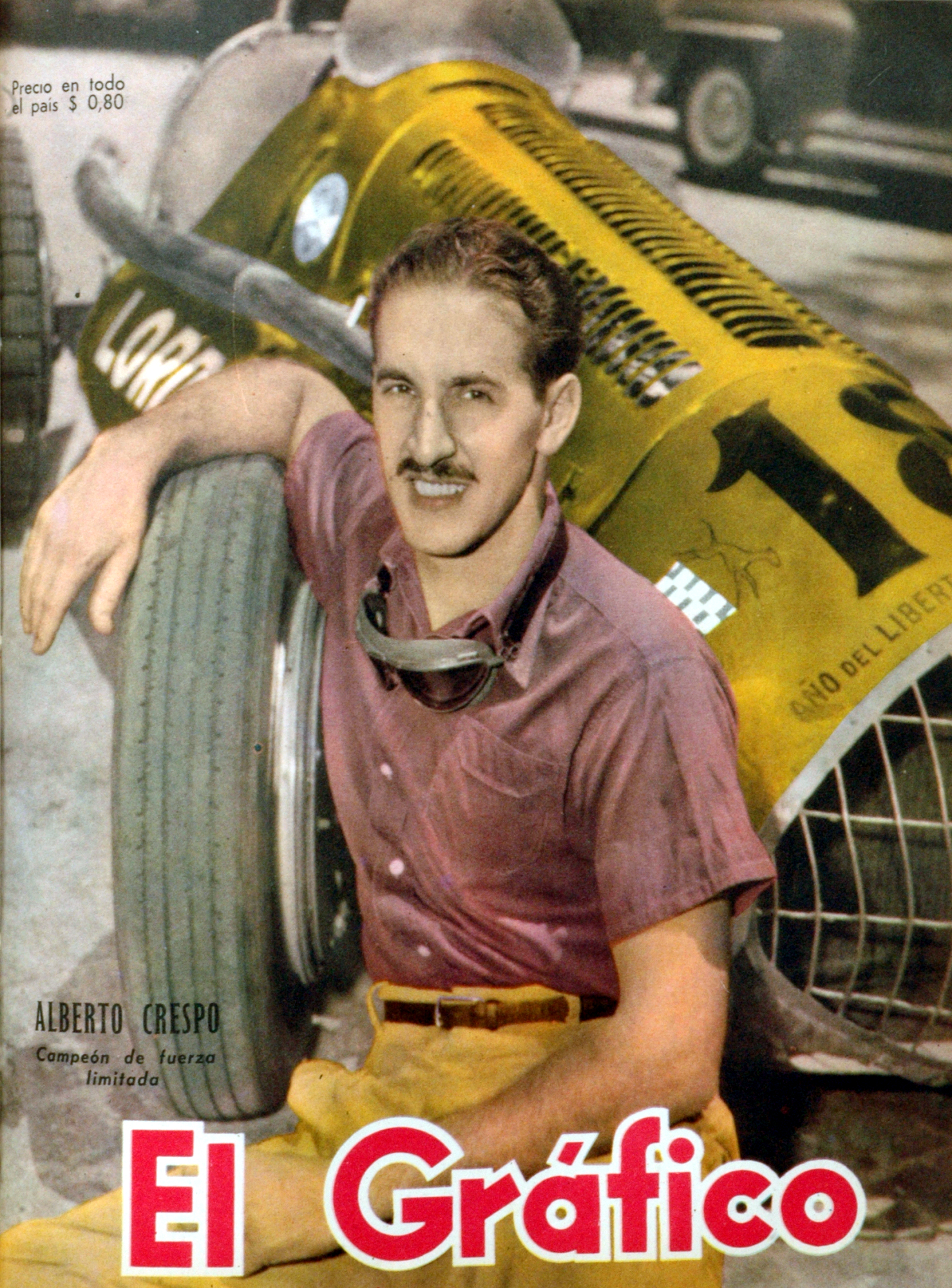 El Grafico del 02 de Febrero de 1951. Edicion 1643